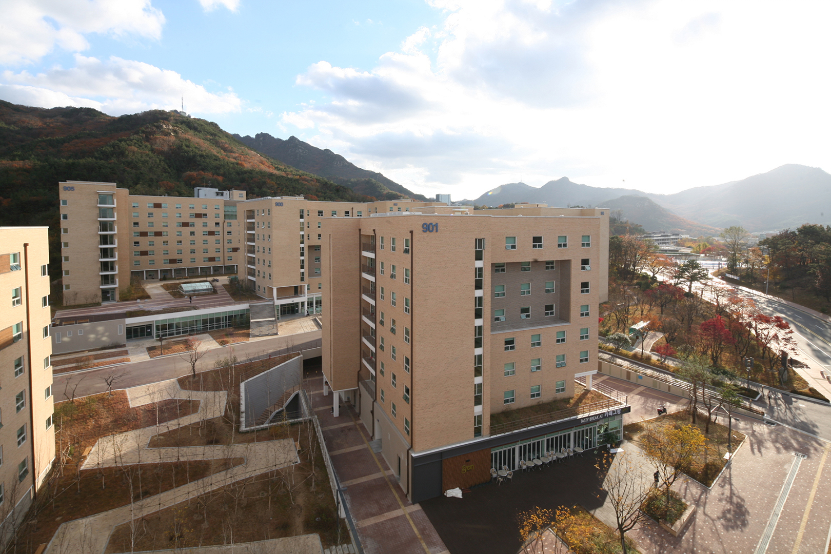 한국어 (조선): 관악사 전경